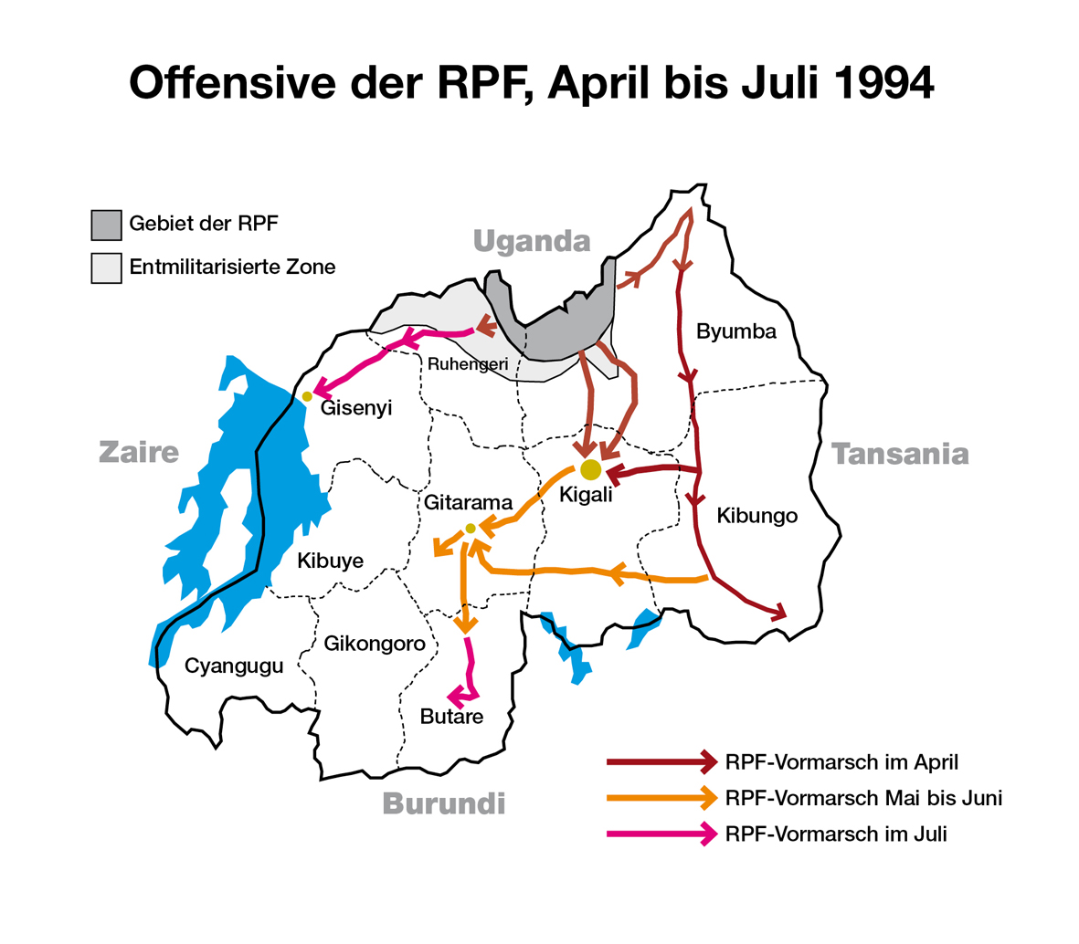 Vormarsch der Rebellenarmee RPF in Ruanda 1994// Offensive of RPF in Rwanda 1994